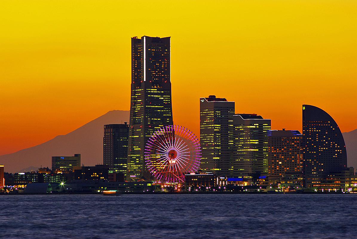 みなとみらい21と富士山の夕景